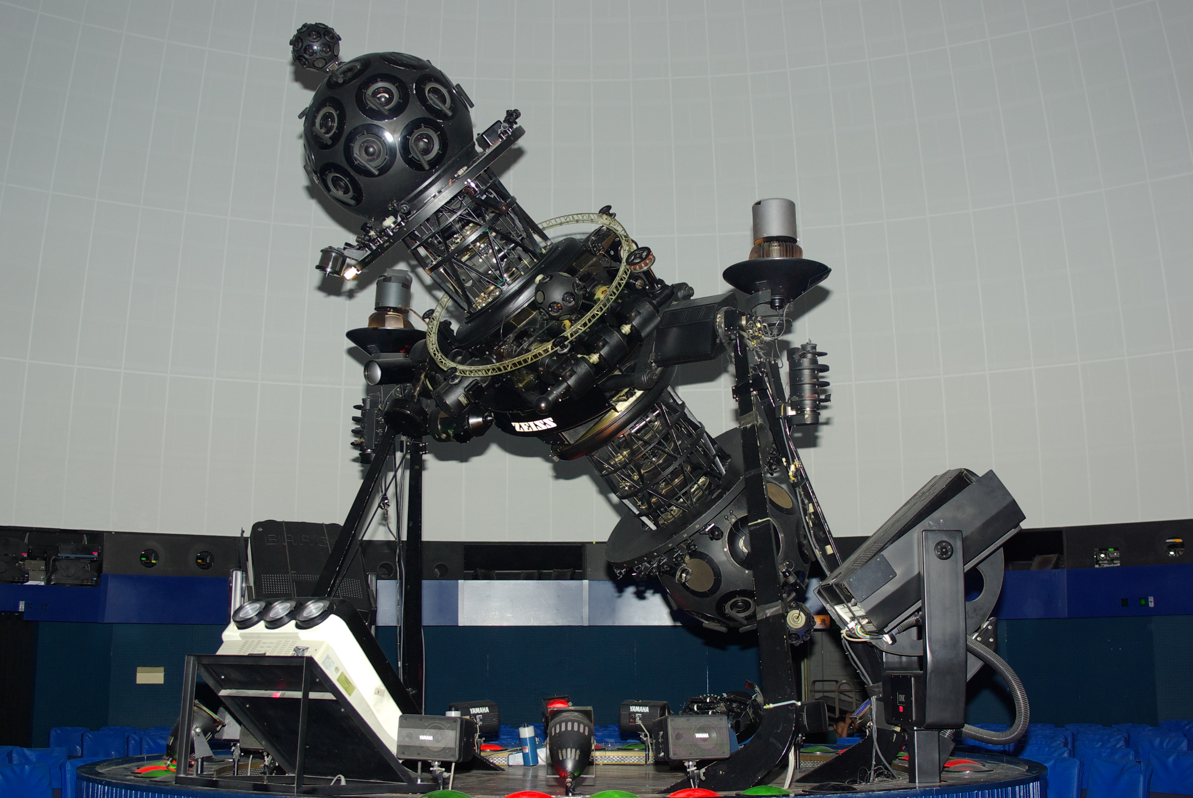 名古屋市科学館のカールツァイス4型プラネタリウム